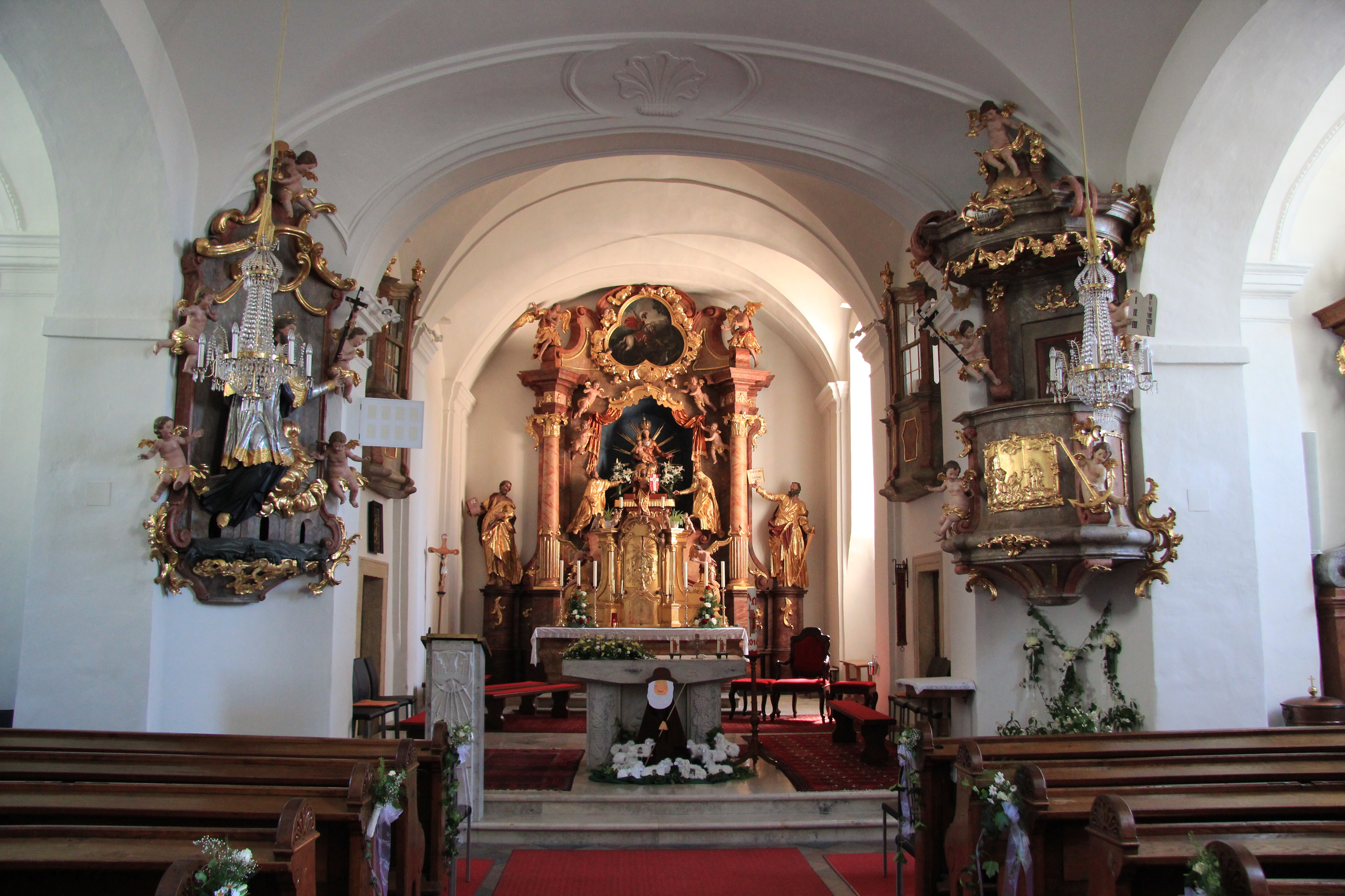 Klöch in der Südoststeiermark